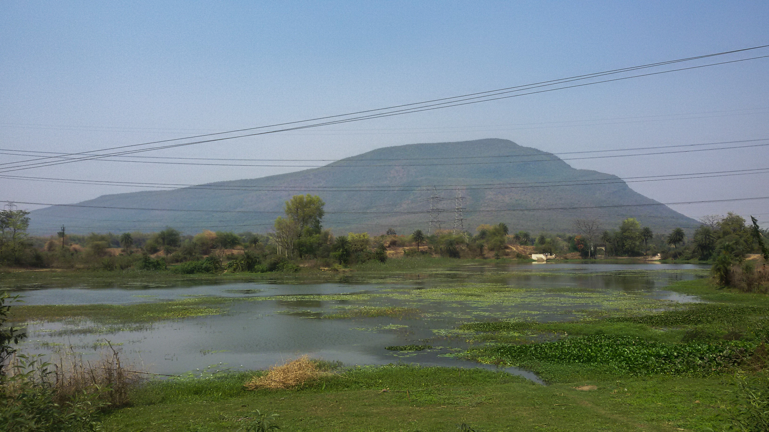 Panchet / Panchakot hill